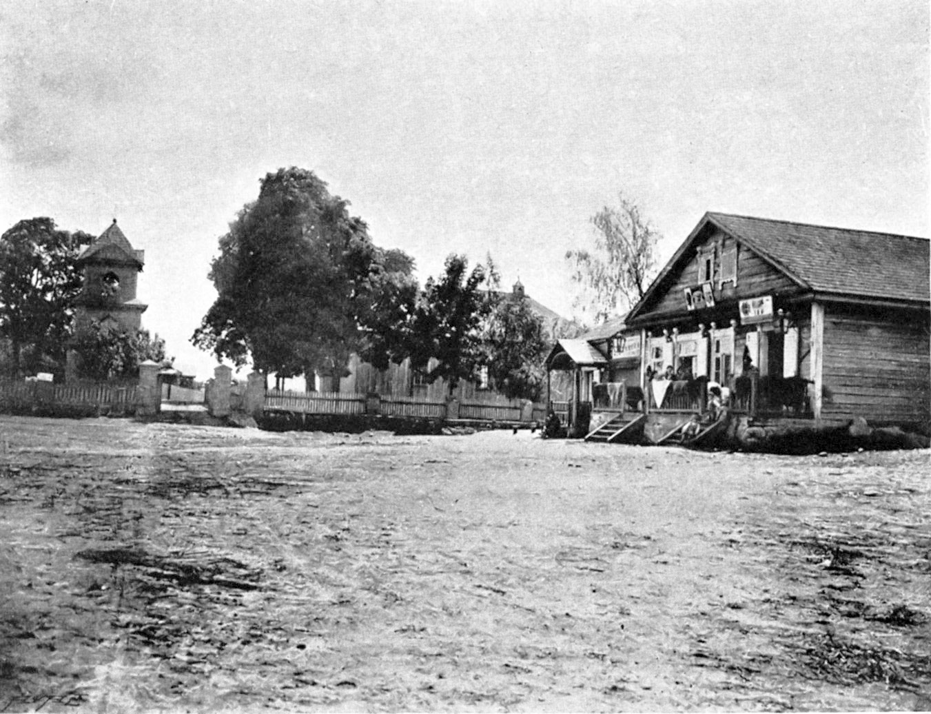 Беларуская (тарашкевіца): Лебедзева (Lebiedzieva), пляц Рынак (plac Rynak). Касьцёл